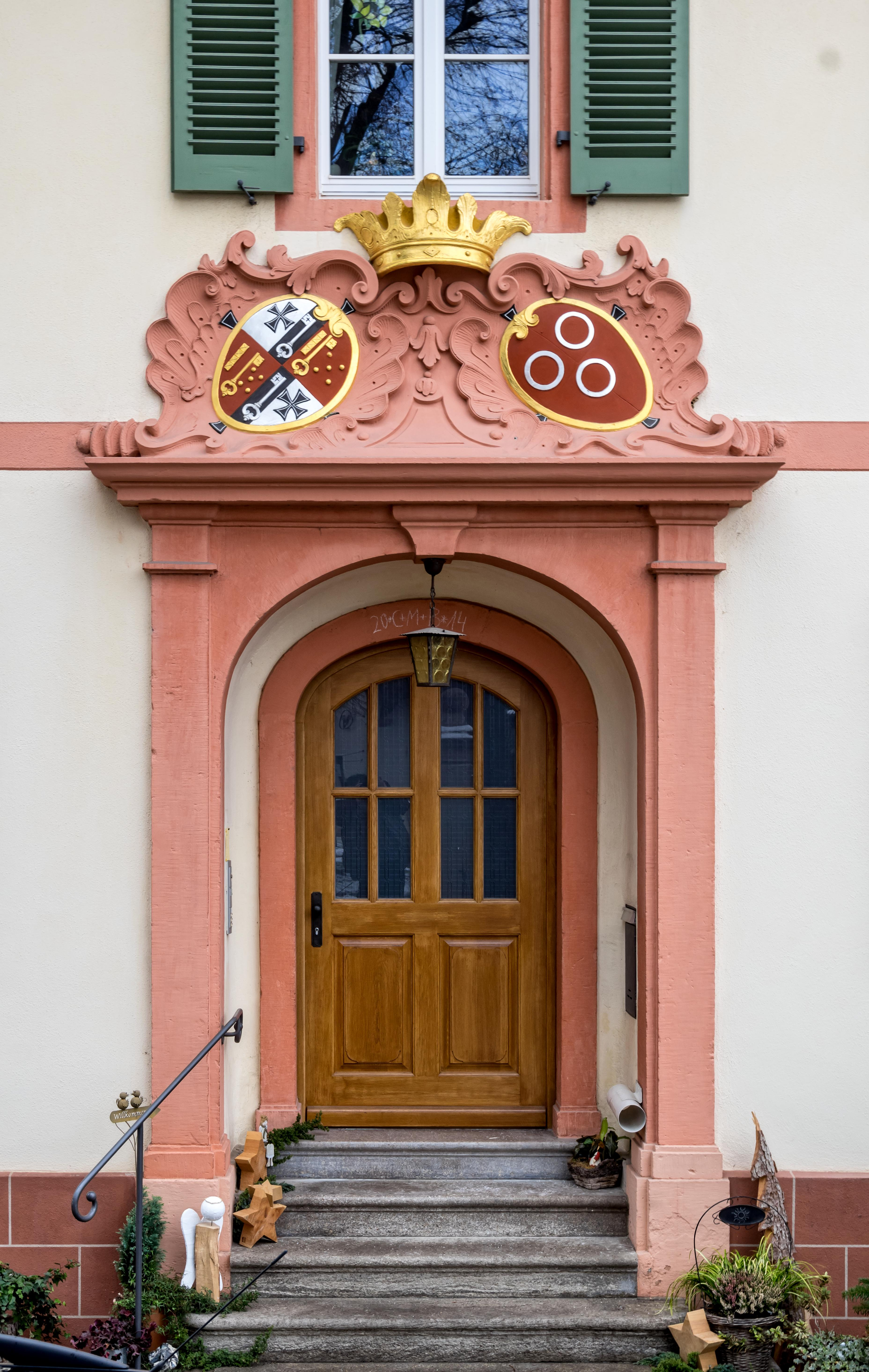 Pfarrhaus der Pfarrei St. Remigius in Merdingen